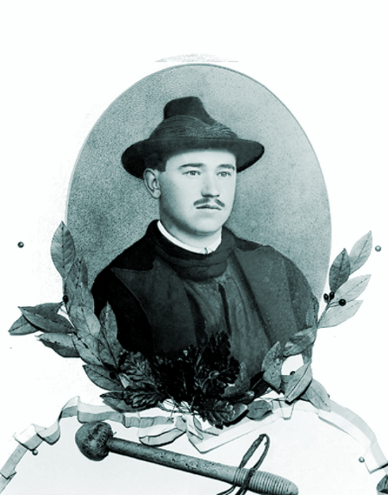 Il 24 aprile 1921, il maestro Franz Innerhofer veniva assassinato dai fascisti nella cosiddetta “domenica di sangue”